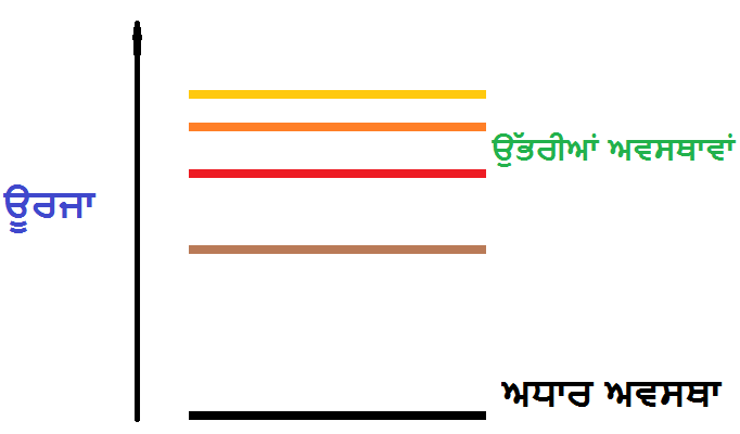 ਪੰਜਾਬੀ: ਕਿਸੇ ਐਟਮ ਵਿੱਚ ਕਿਸੇ ਇਲੈਕਟ੍ਰੌਨ ਵਾਸਤੇ ਊਰਜਾ ਲੈਵਲ: ਅਧਾਰ ਅਵਸਥਾ ਅਤੇ ਐਕਸਾਈਟਡ ਅਵਸਥਾਵਾਂ: ਊਰਜਾ ਸੋਖਣ ਤੋਂ ਬਾਦ, ਇੱਕ ਇਲੈਕਟ੍ਰੌਨ ਅਧਾਰ ਅਵਸਥਾ ਤੋਂ ਕਿਸੇ ਉੱਚ ਊਰਜਾ ਵਾਲੀ ਉੱਭਰੀ ਹੋਈ ਅਵਸਥਾ ਉੱਤੇ ਜੰਪ ਕਰ ਸਕਦਾ ਹੈ।